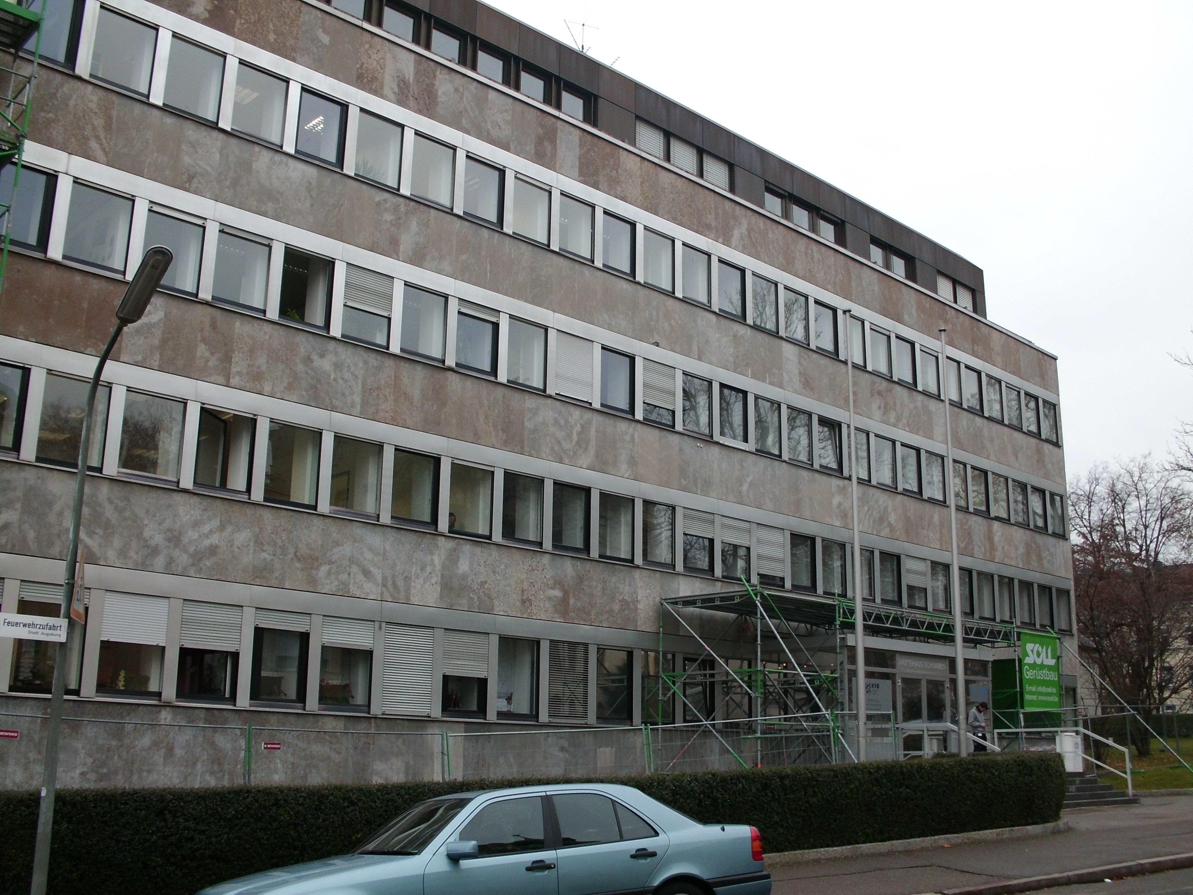 Ansicht des Arbeitsgerichts in Augsburg